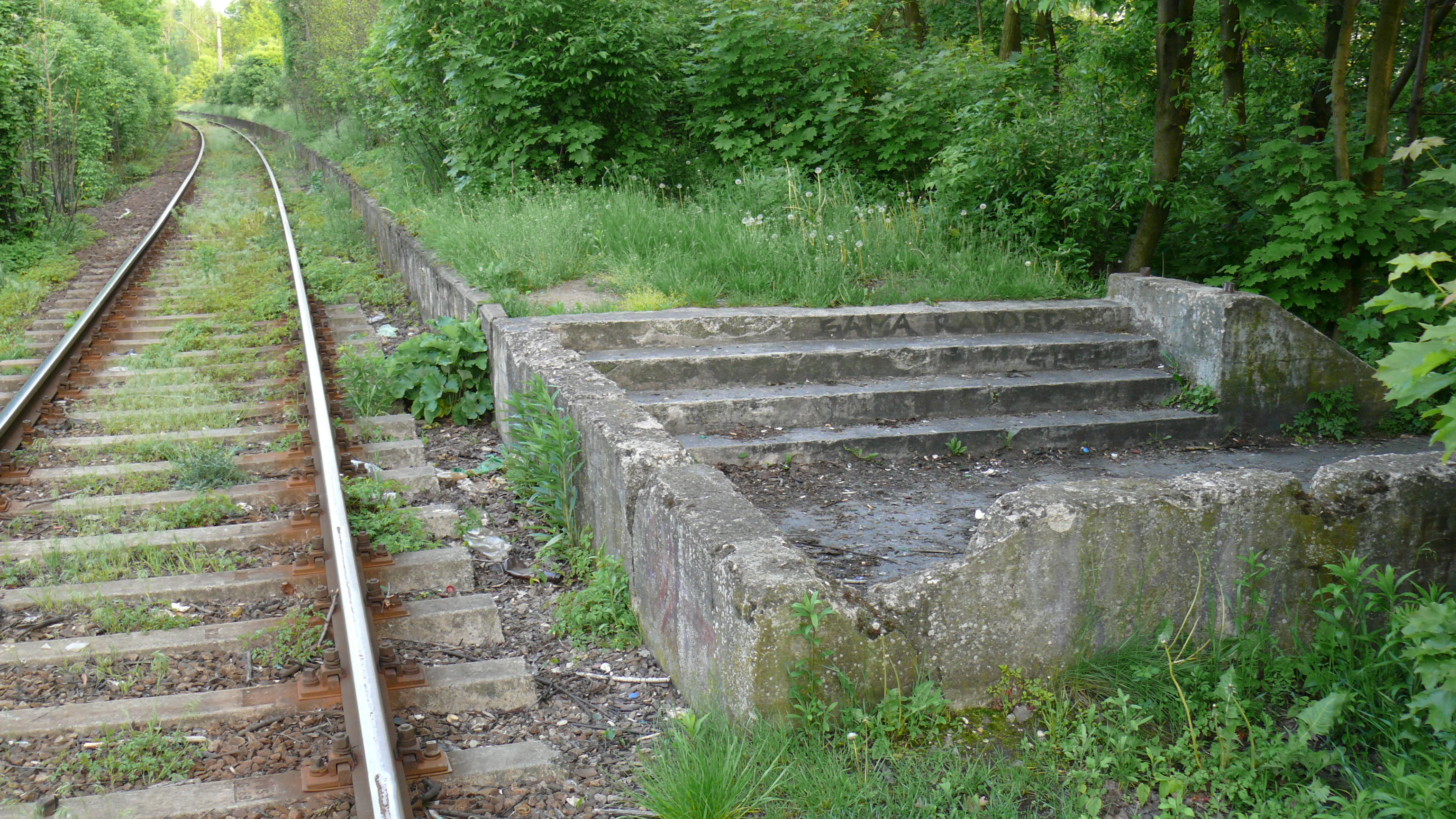 Przystanek Arturówek w Łodzi